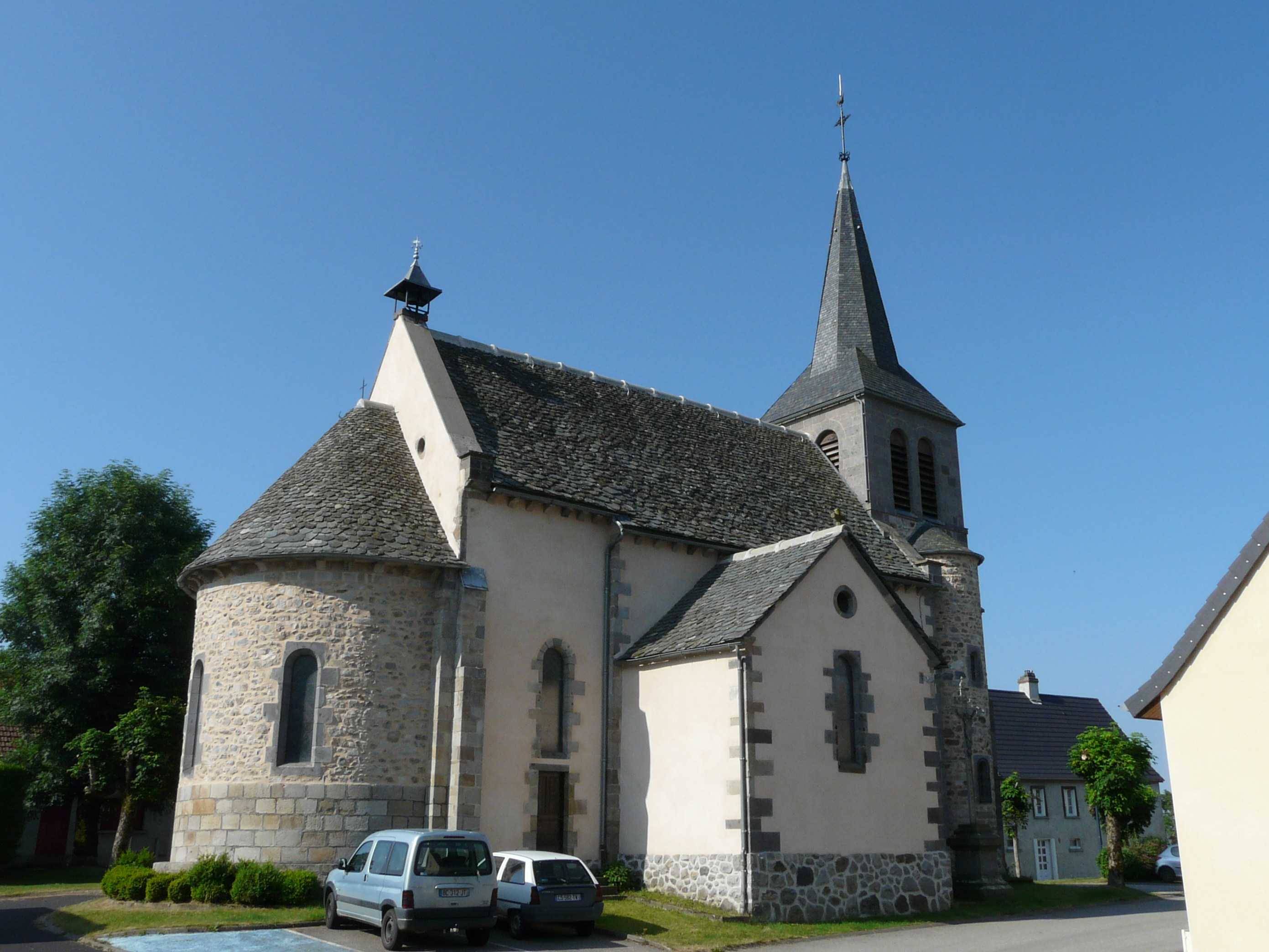 L'église Sainte-Madeleine, Cros, Puy-de-Dôme, France.